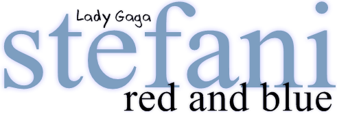 Logo del EP de Lady Gaga "Red and Blue"